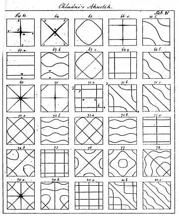 Beispiele für Chladnische Klangfiguren für quadratische Platten